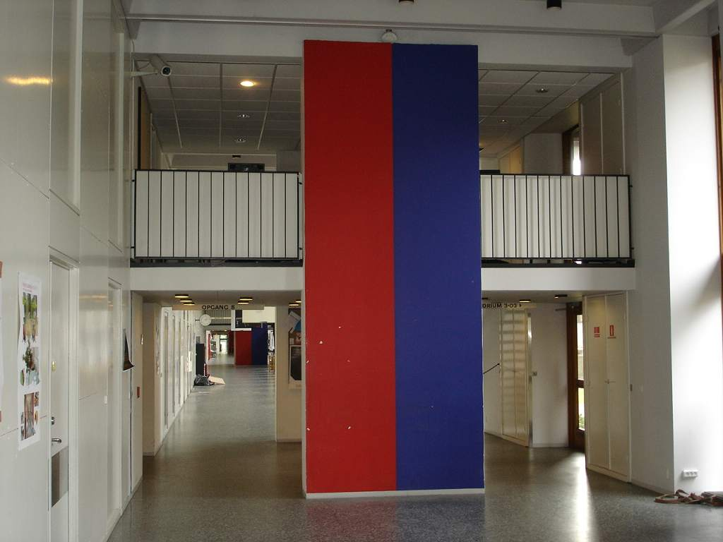 Billede af udsmykning udført af kunstneren Albert Mertz til Landbohøjskolens vandrehal i 1972 Tilladelse til at bruge billedet på Wikipedia er givet af Lone Mertz. Fotograf og upload af billede; Nis Rømer under vilkårene: CC share alike 3.0